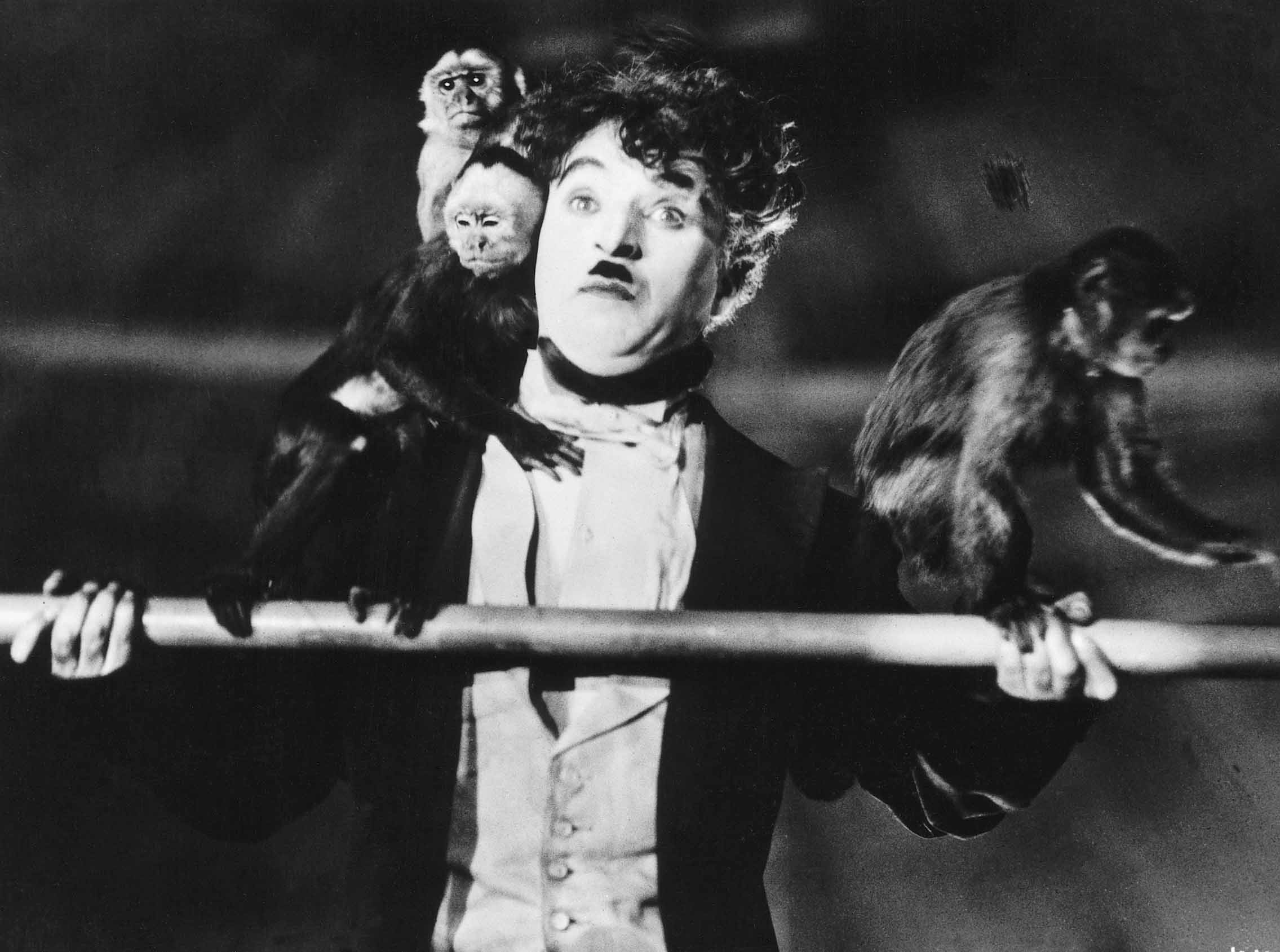 tomada y extraida del film circo de chaplin